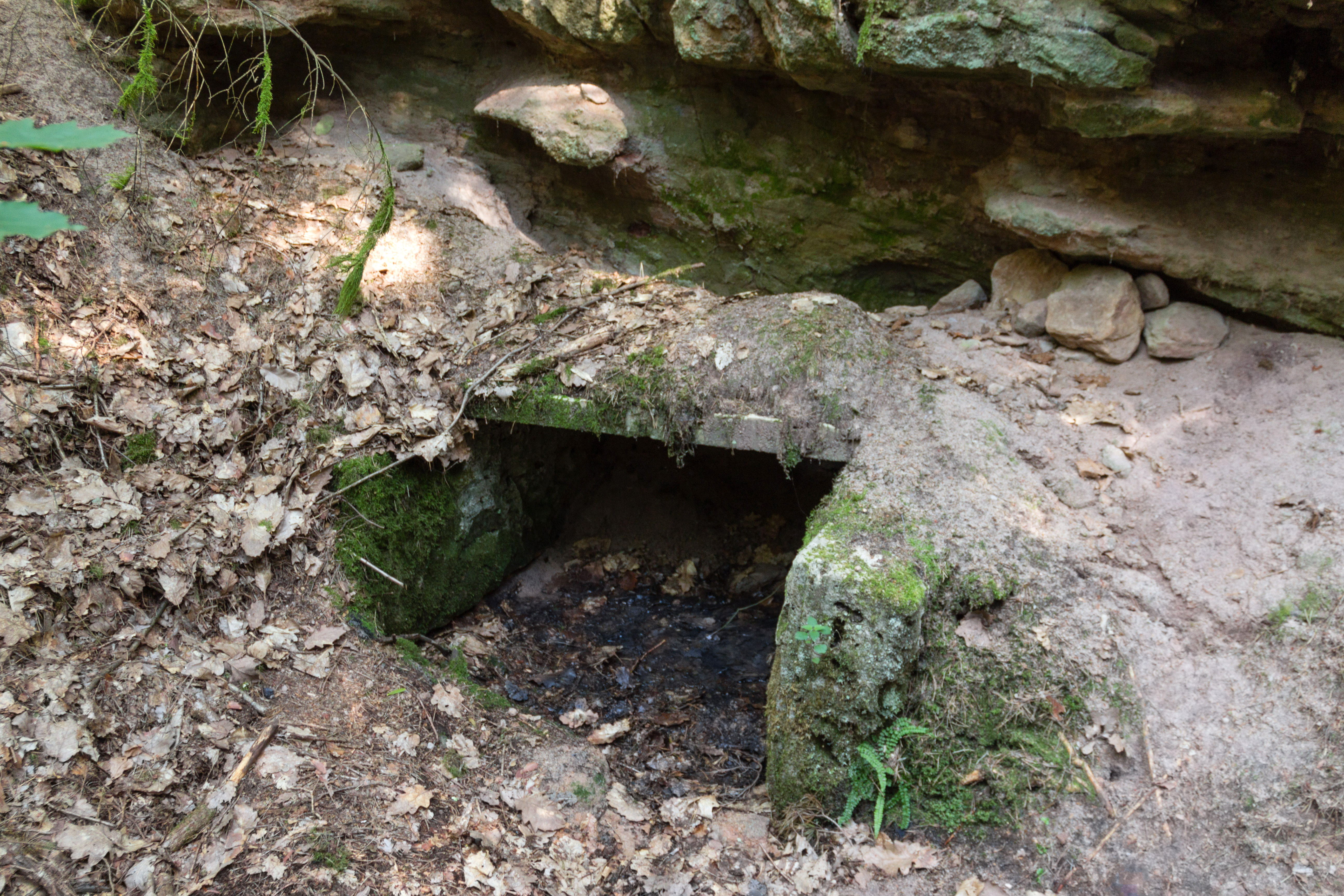 Schichtquelle, Wernloch, Wendelstein, Schutz des Landschaftsraumes im Gebiet des Landkreises Roth - "Südliches Mittelfränkisches Becken östlich der Schwäbischen Rezat und der Rednitz mit Vorland der Mittleren Frankenalb" (LSG Ost)